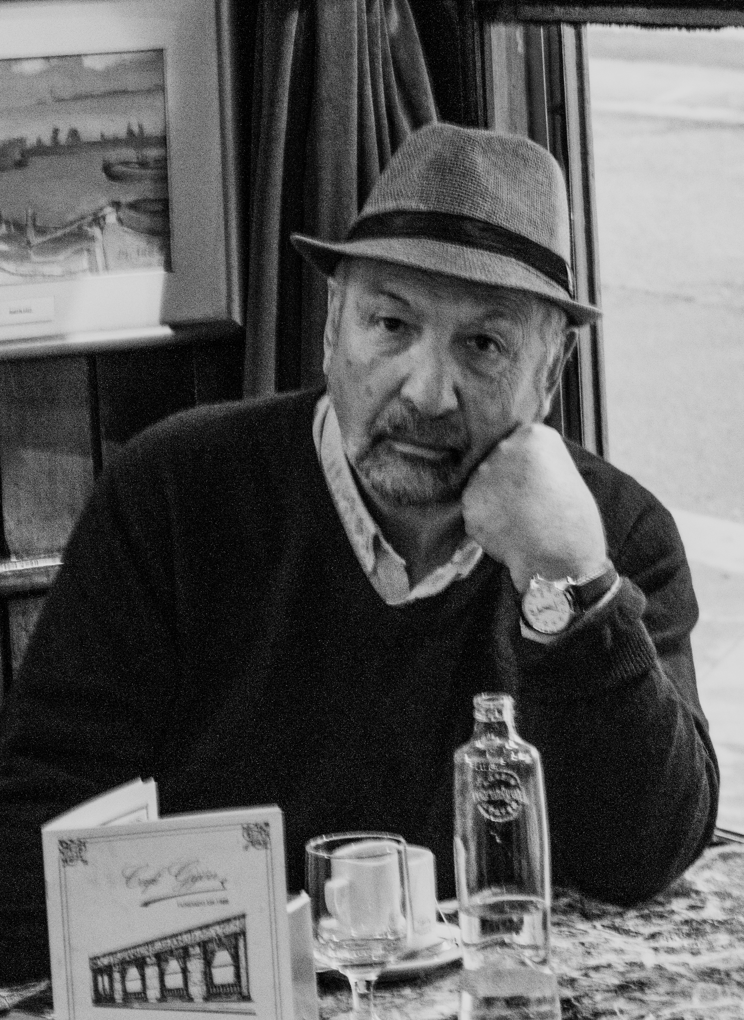 Javier Vásconez en el café Gijon Foto de: Patricio Burbano